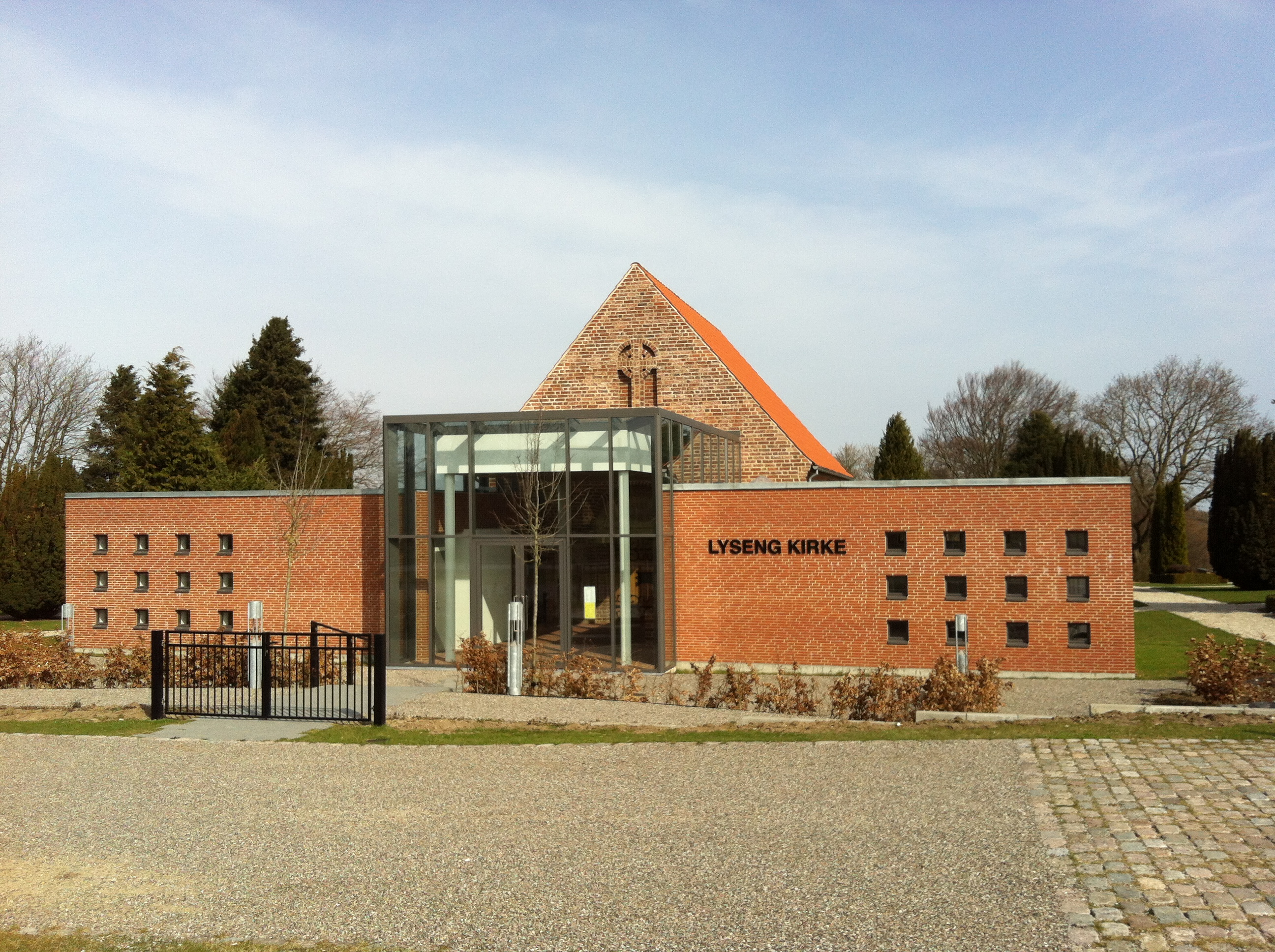 Lyseng Kirke d. 28. marts 2012